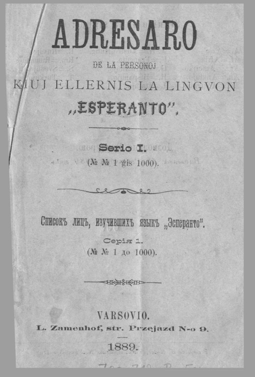 Titolpaĝo de la unua adresaro de esperantistoj (1889), farita de Zamenhof